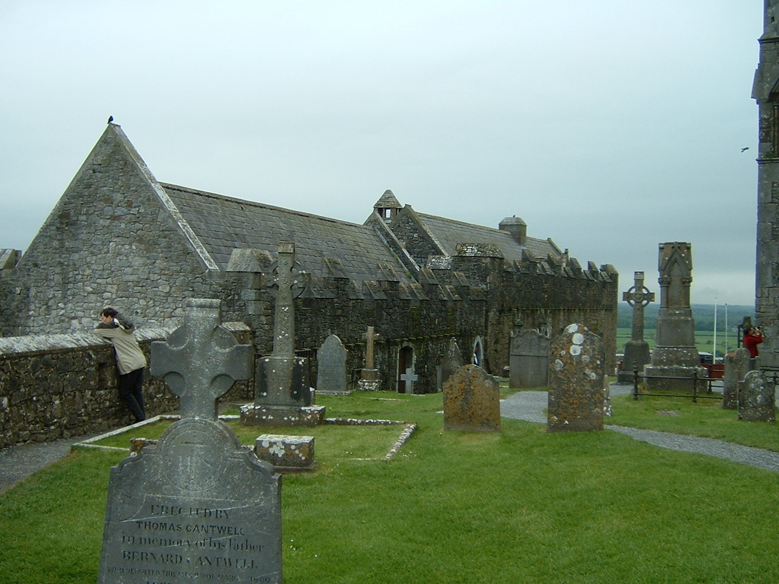 Bildbeschreibung: Rock of Cashel Quelle: selbst gemacht Fotograf/Zeichner: Harald Köster, Bochum, Germany Datum: May 2005